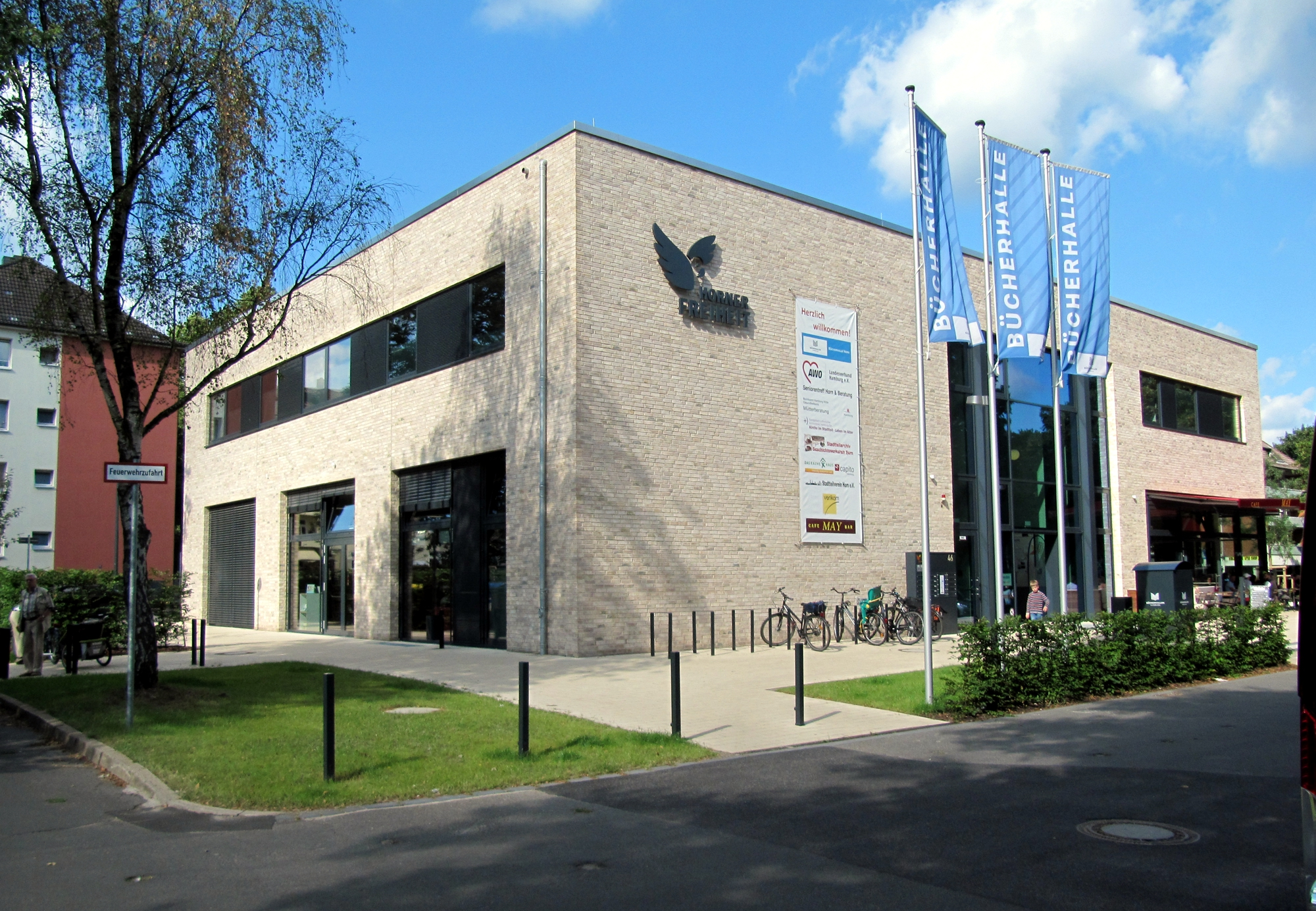 Bürgerhaus "Horner Freiheit" in Hamburg-Horn